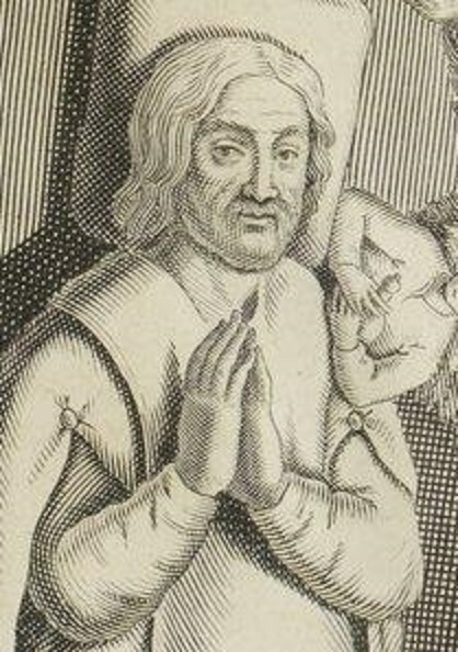 Détail du gisant du tombeau de Robert IV, comte d'Auvergne, dans l'abbaye du Bouschet.